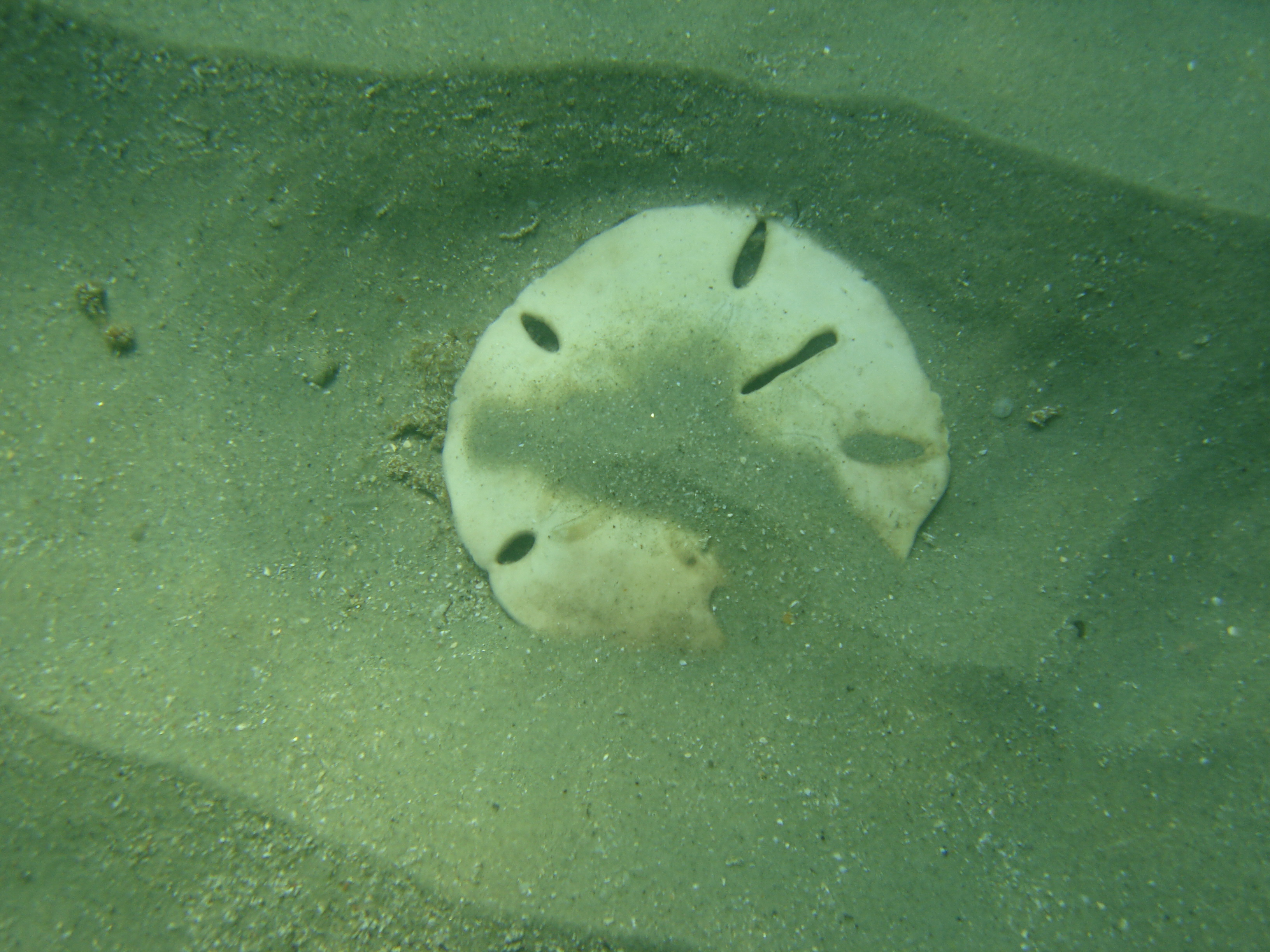 Foto de uma bolacha da praia.